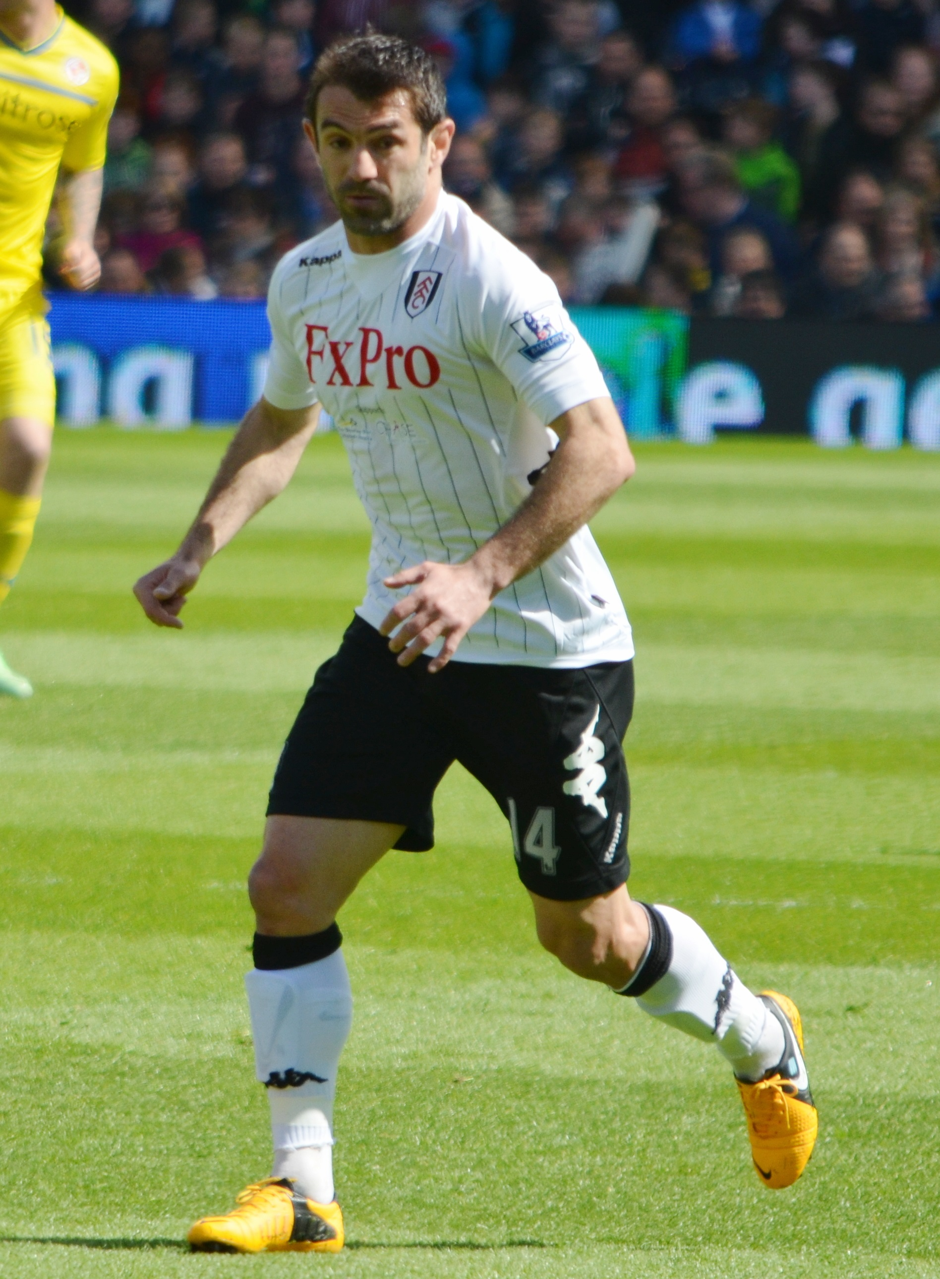 Giorgos Karagounis playing for Fulham against Reading in May 2013.